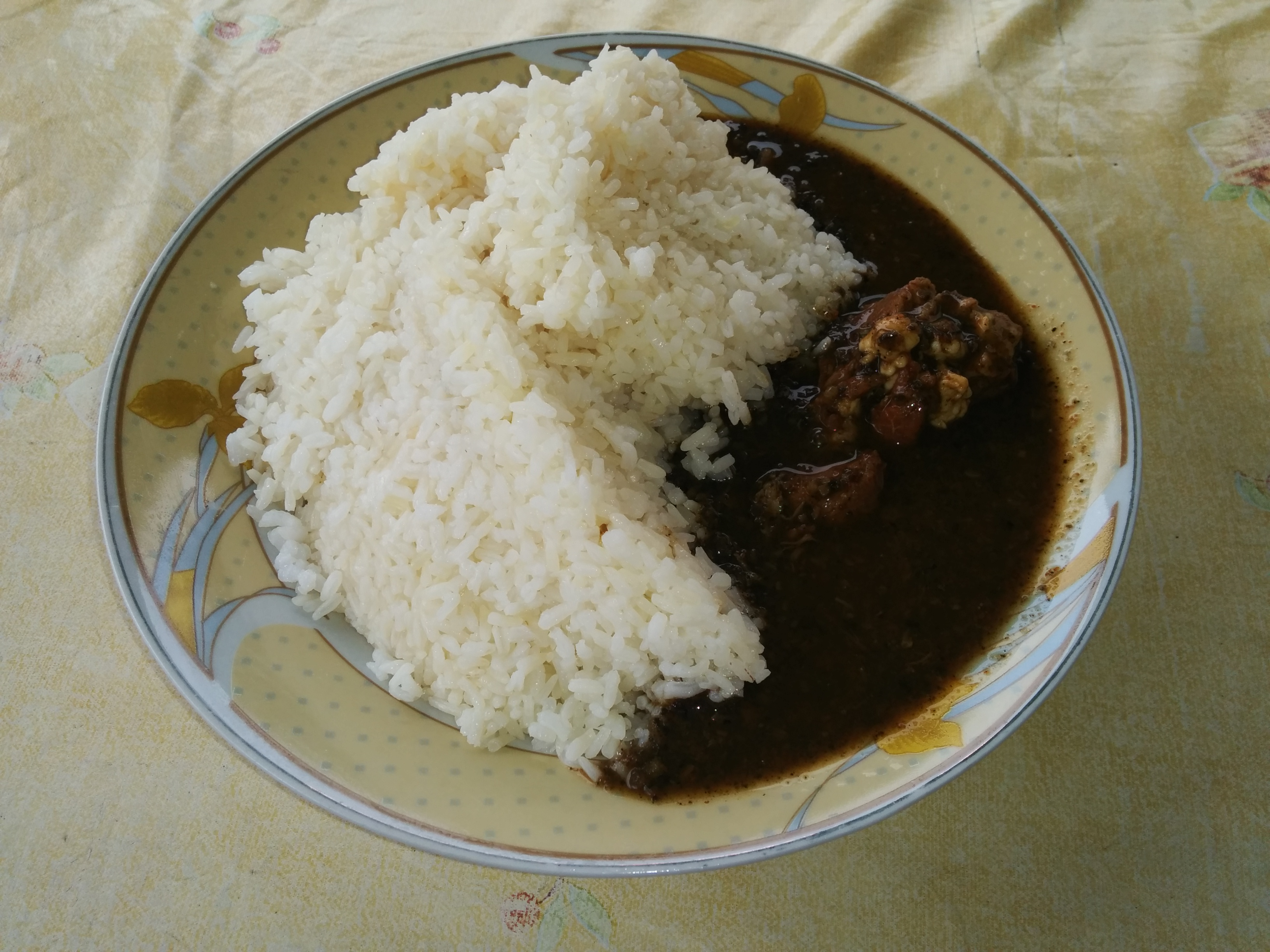 Riz sauce djoumblé This is an image of food from Ivory Coast